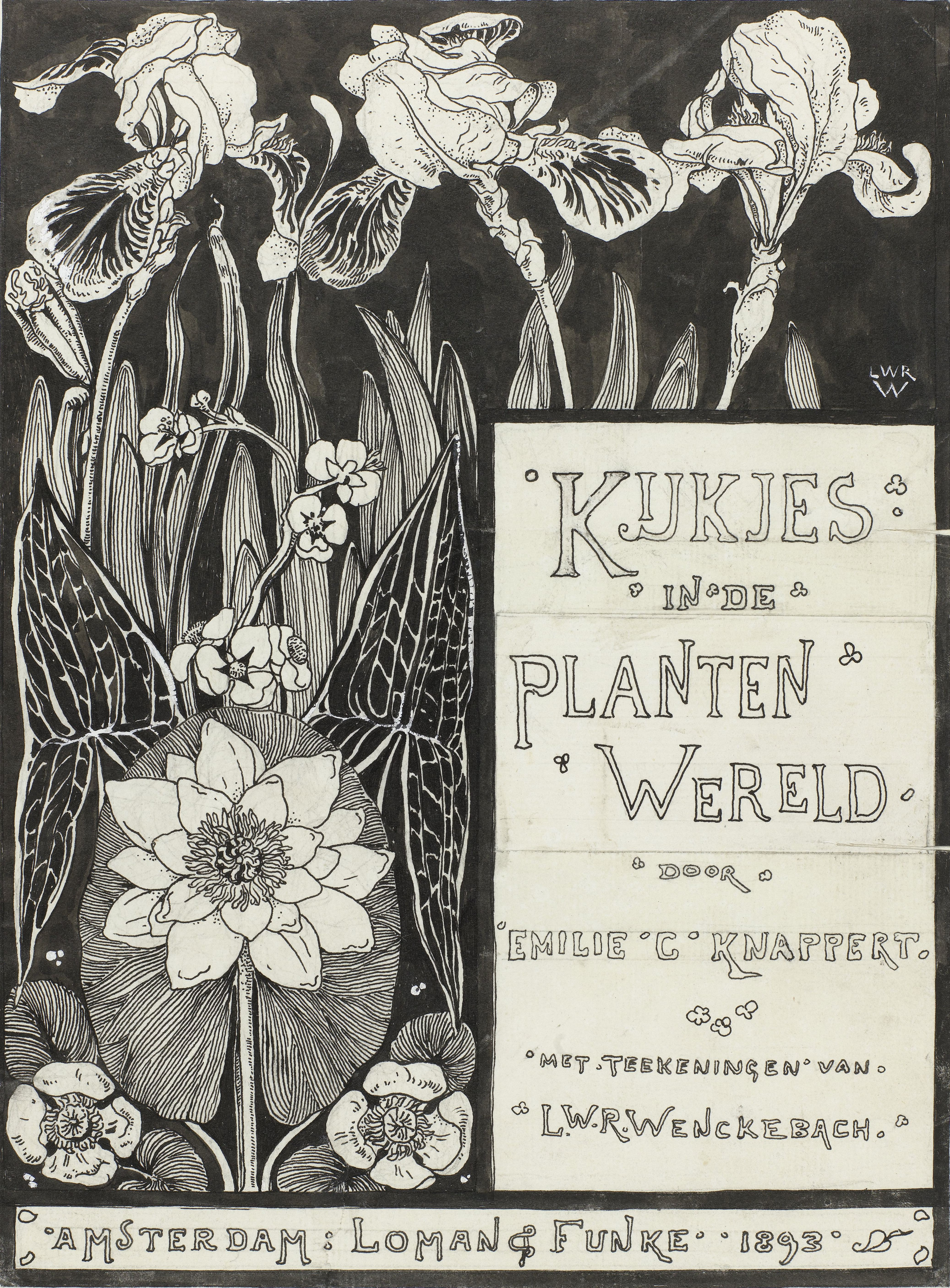 Ontwerp voor de boekband van Kijkjes in de Plantenwereld door Emilie C. Knappert met teekeningen van L.W.R. Wenckebach, Amsterdam: Loman & Funke .1893.